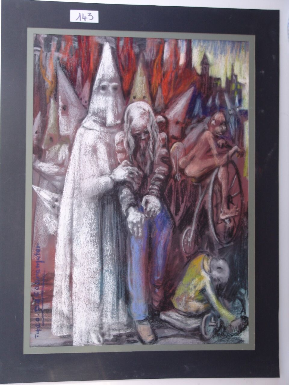 Schilderwerk, olieverf op paneel, getiteld 'Ku Klux Klan, door Theo De Cooremeter, kunstschilder, Mendonk, België, 1989